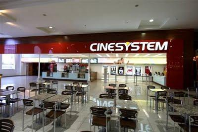 Fachada do Cinesystem instalado no Shopping Rio Anil de São Luís, MA